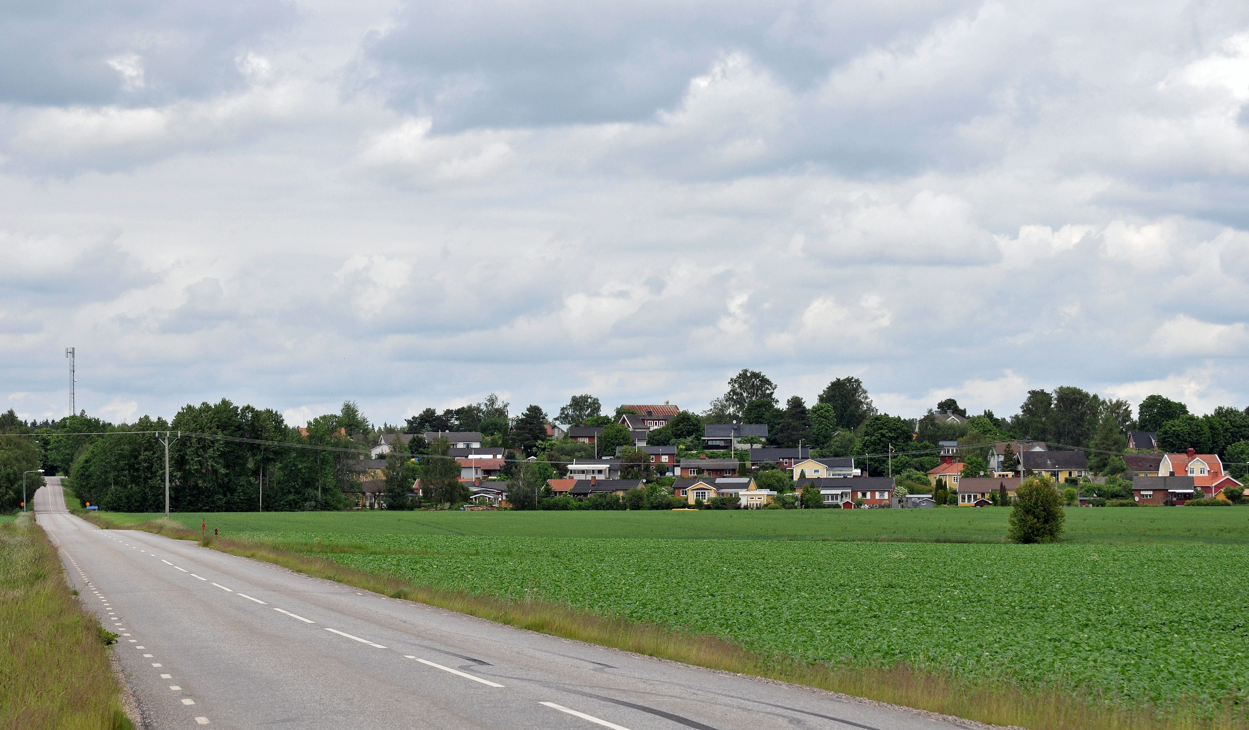 Enstaberga i Nyköpings kommun